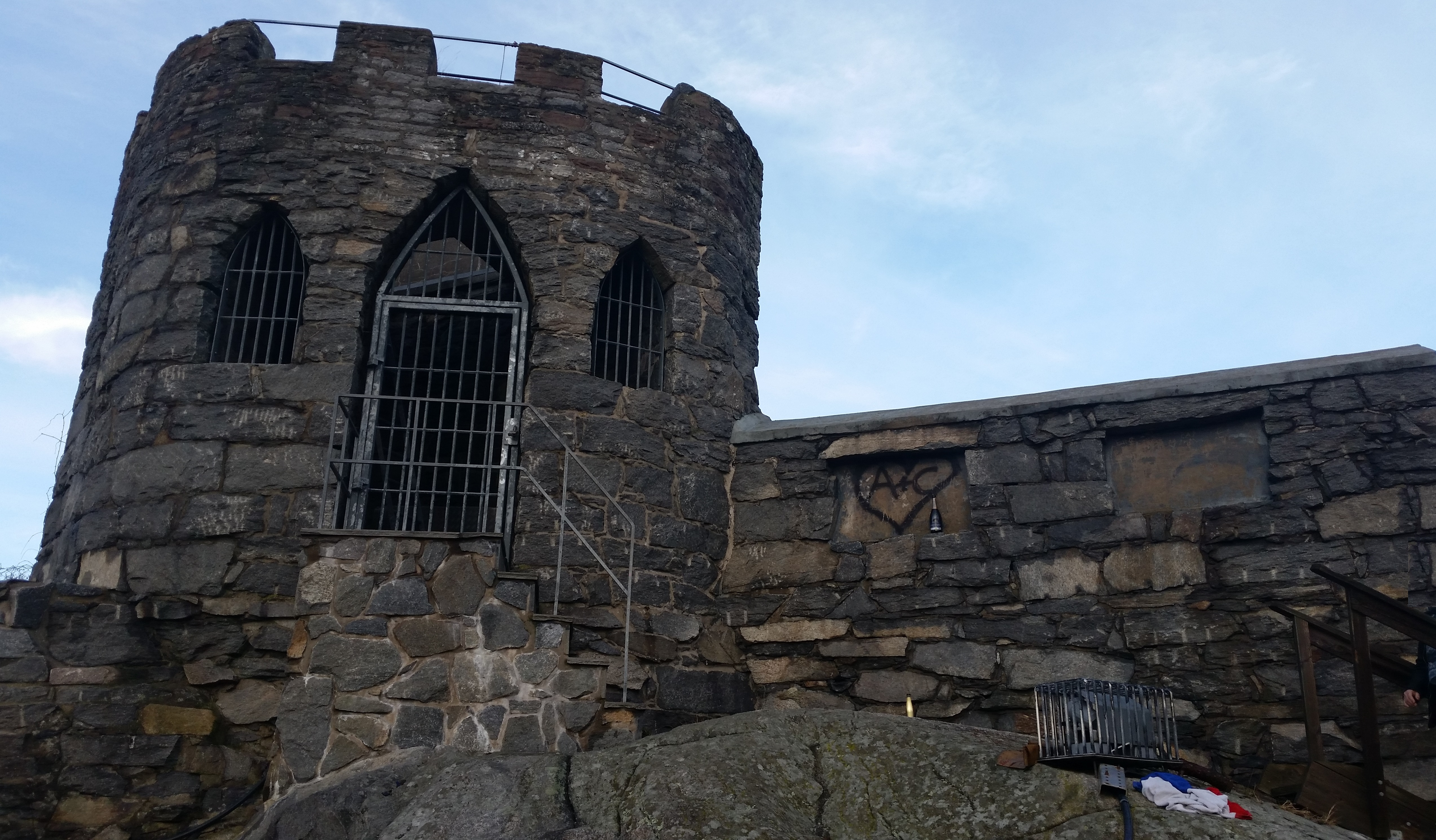 Borgkulissen i Partille